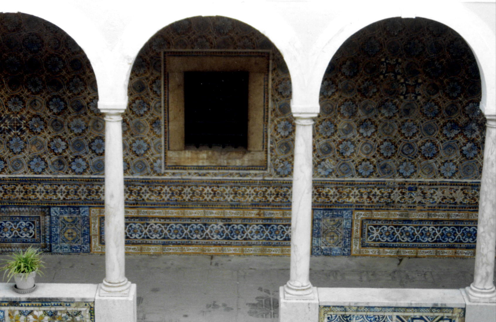 Antigo Convento de Nossa Senhora dos Mártires e da Conceição de Sacavém